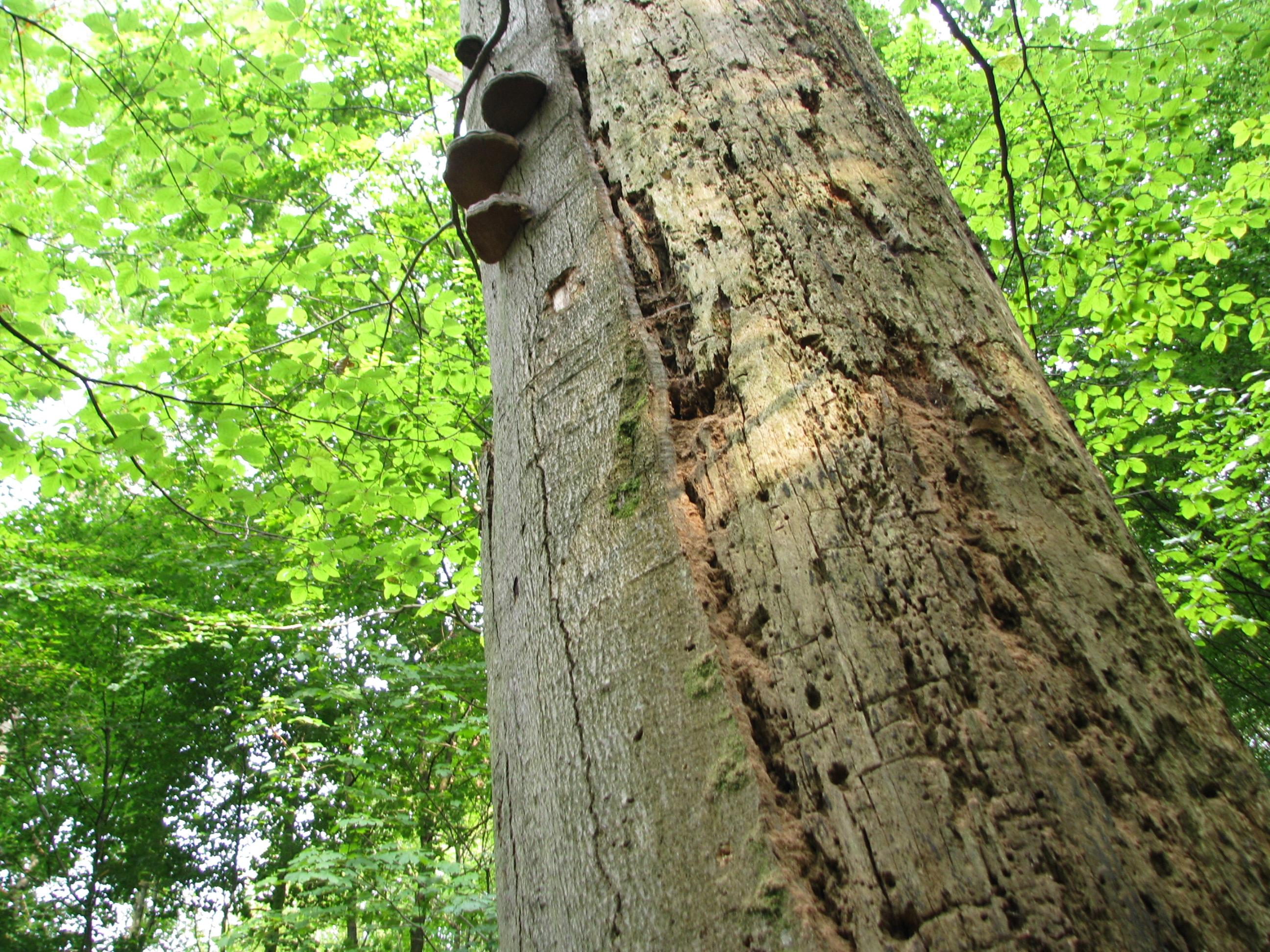 Alte Buche im Valby Hegn (Nationalpark Kongernes Nordsjaelland)/Dänemark.